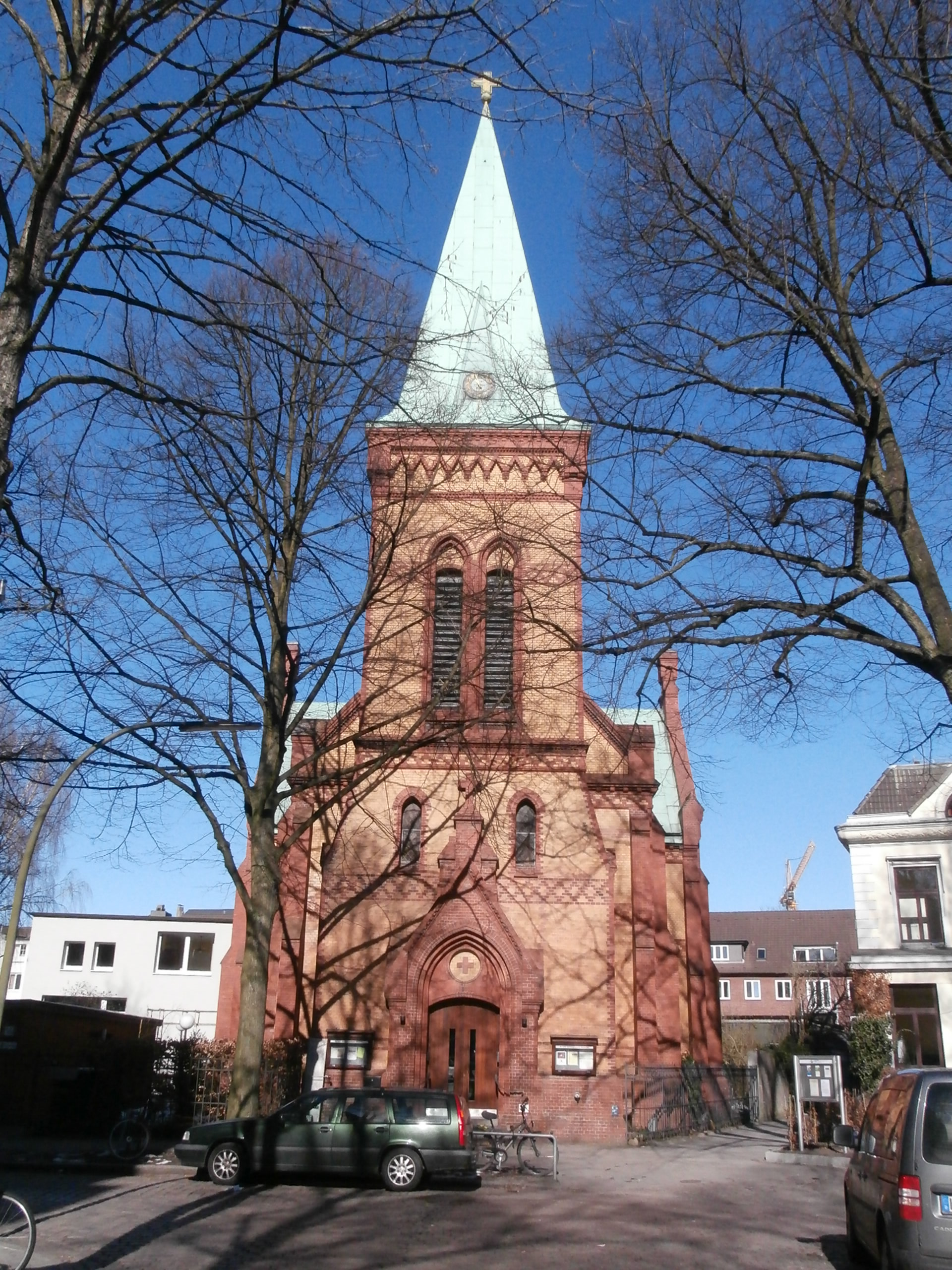 Helenstiftskapelle (Christopheruskirche) von 1892/94This is a photograph of an architectural monument.